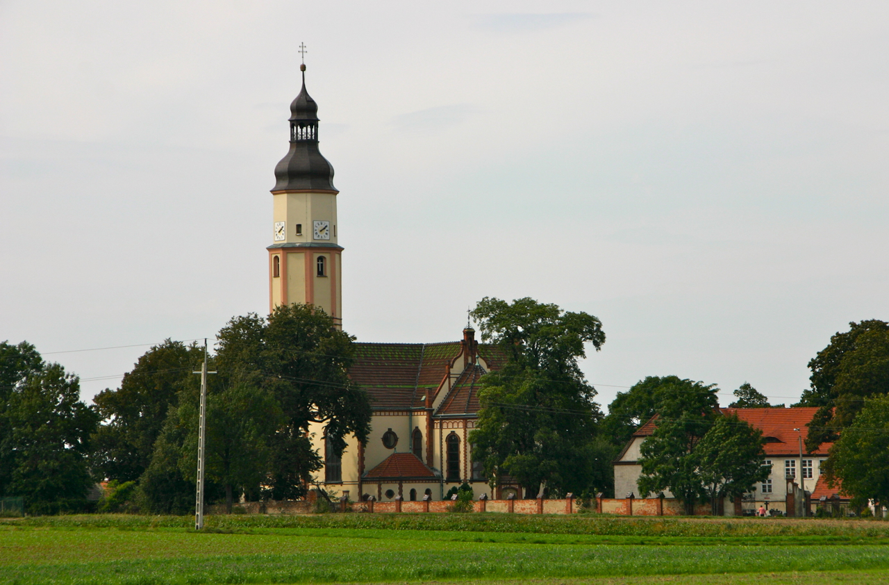 Wierzch - rzymskokatolicki kościół parafialny pw. św. Wawrzyńca (nr 1), XVI w., 1904